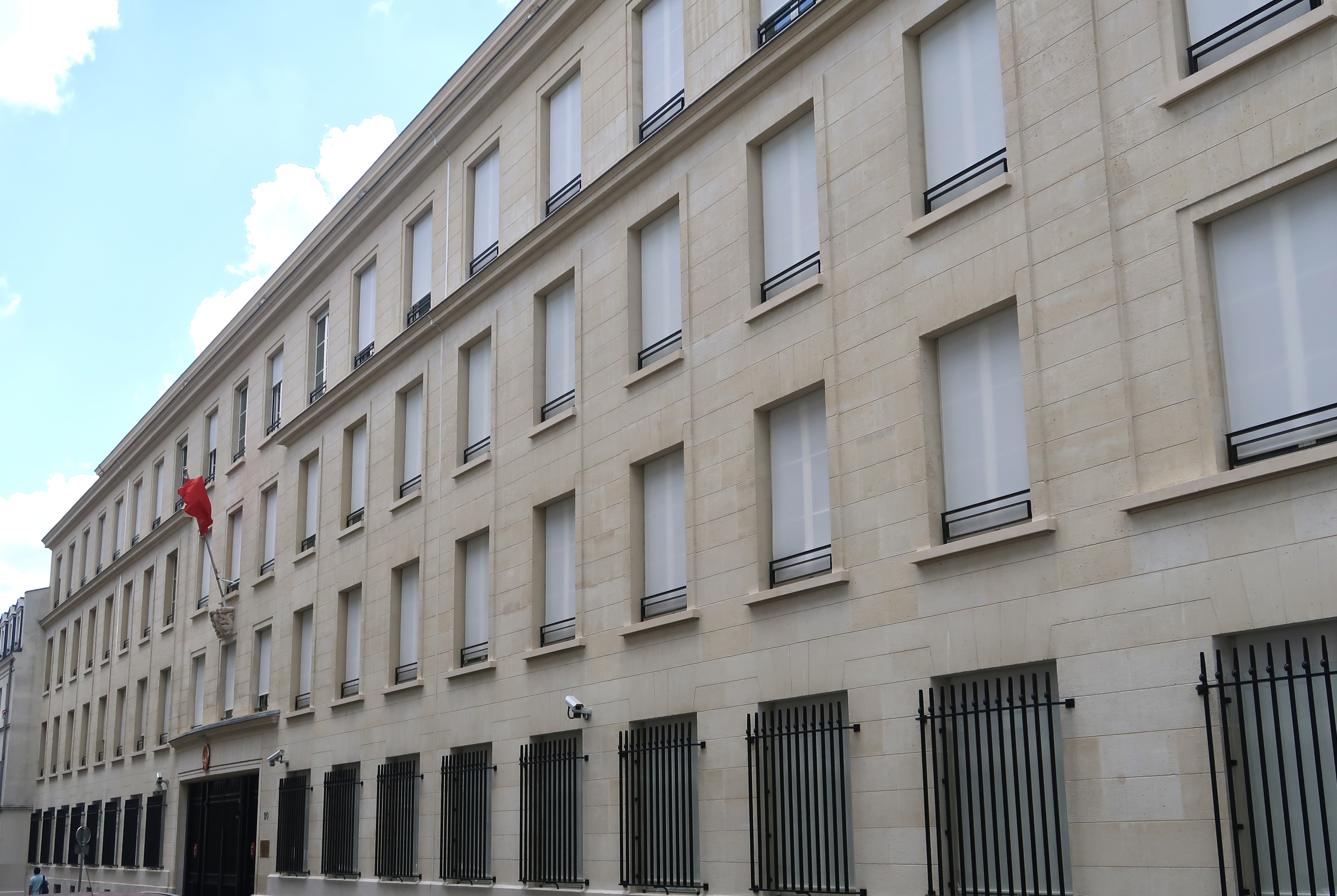 Hôtel de Montesquiou, 20 rue Monsieur (Paris 7e).